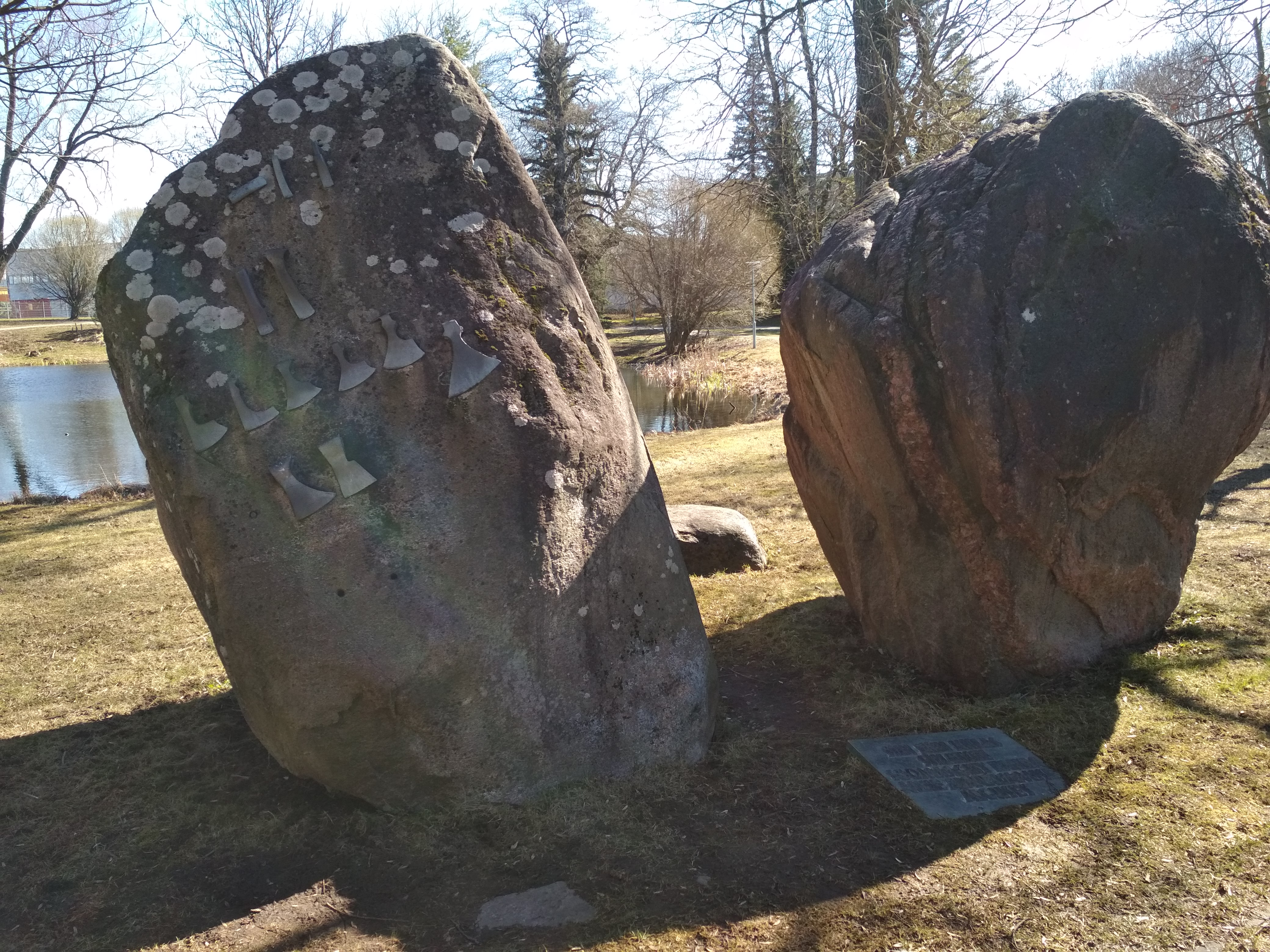 Jüri rauasulatuskoha mälestuskivid (Jüri alevik)